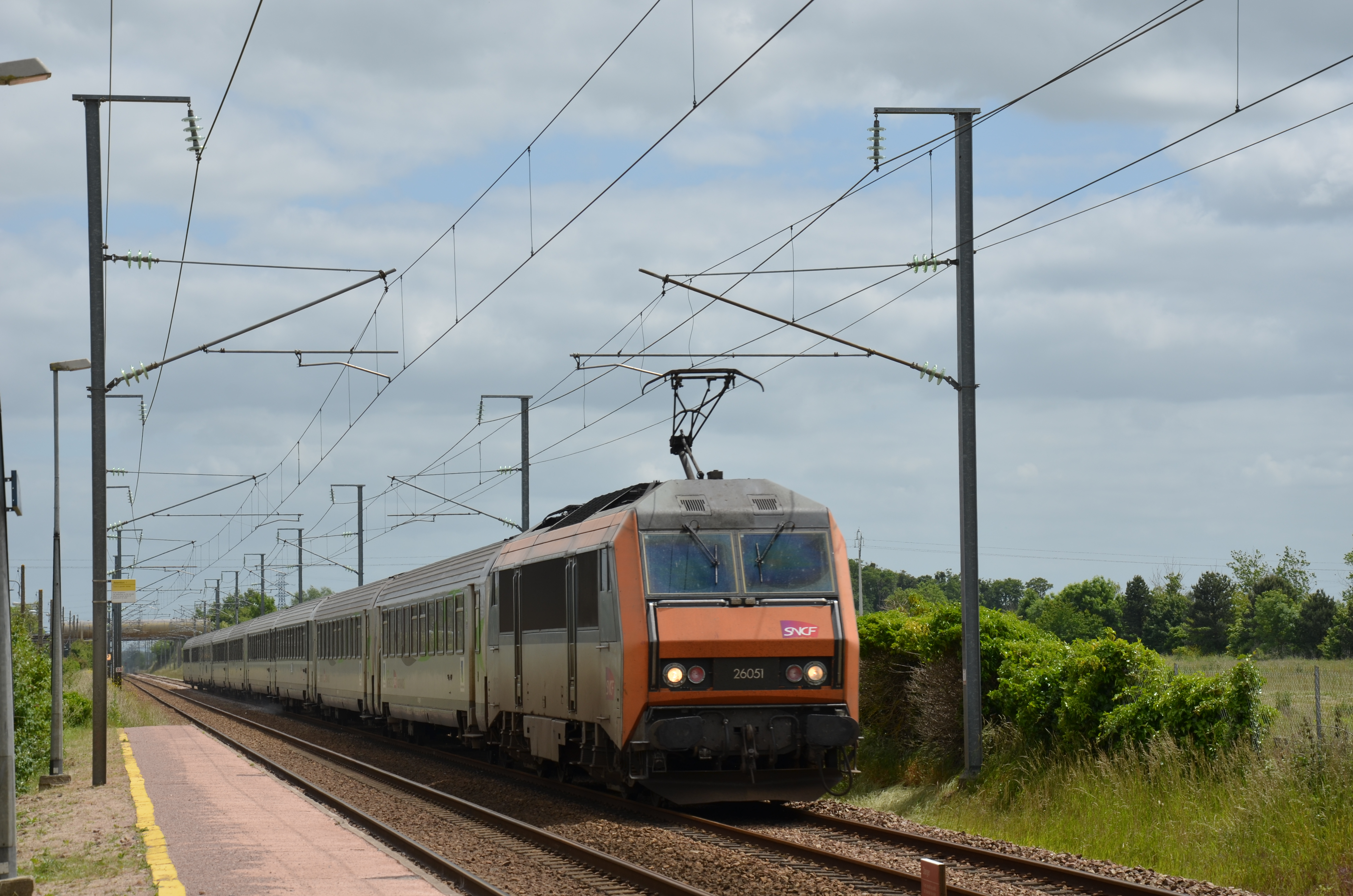 Sybic BB 26051 + Corail assurant la liaison Paris Saint-Lazare / Cherbourg via Caen, en gare de Frénouville-Cagny (train n°3307).